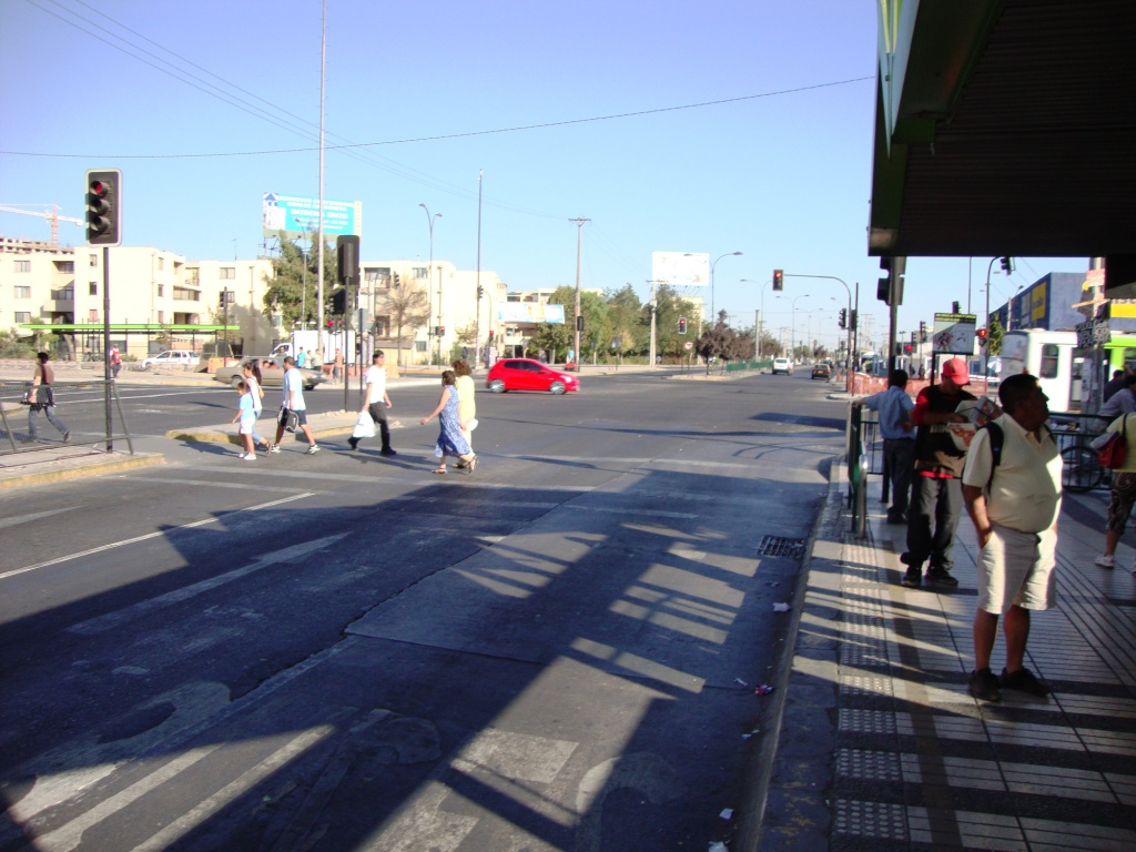 Imagen de la Av. Las Rejas